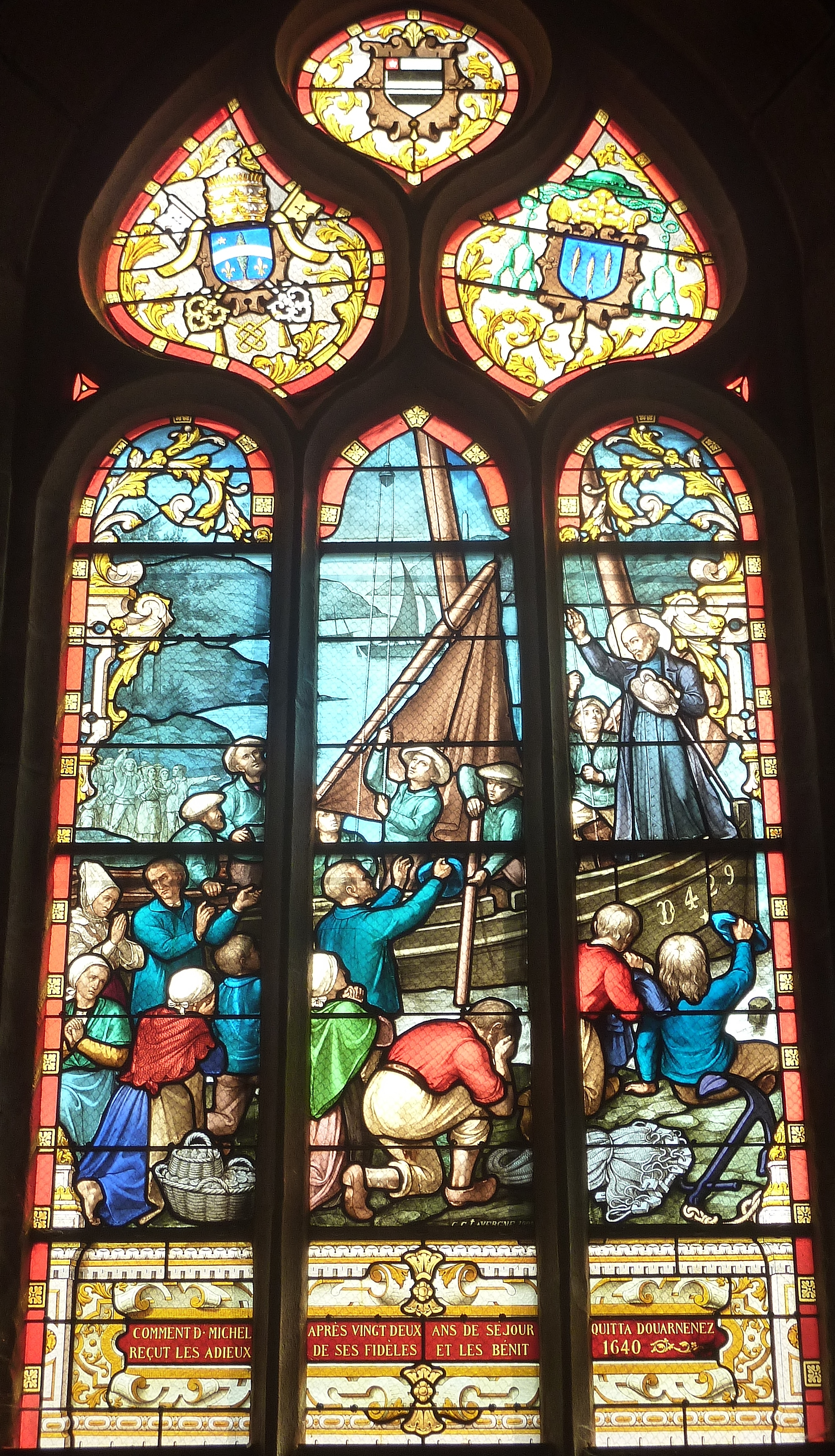 Ploaré : église paroissiale Saint-Herlé, vitrail "Comment Michel Le Nobletz après 22 ans de séjour quitta Douarnenez, reçut les adieux de ses fidèles et les bénit. 1640." (1909, atelier Lavergne).